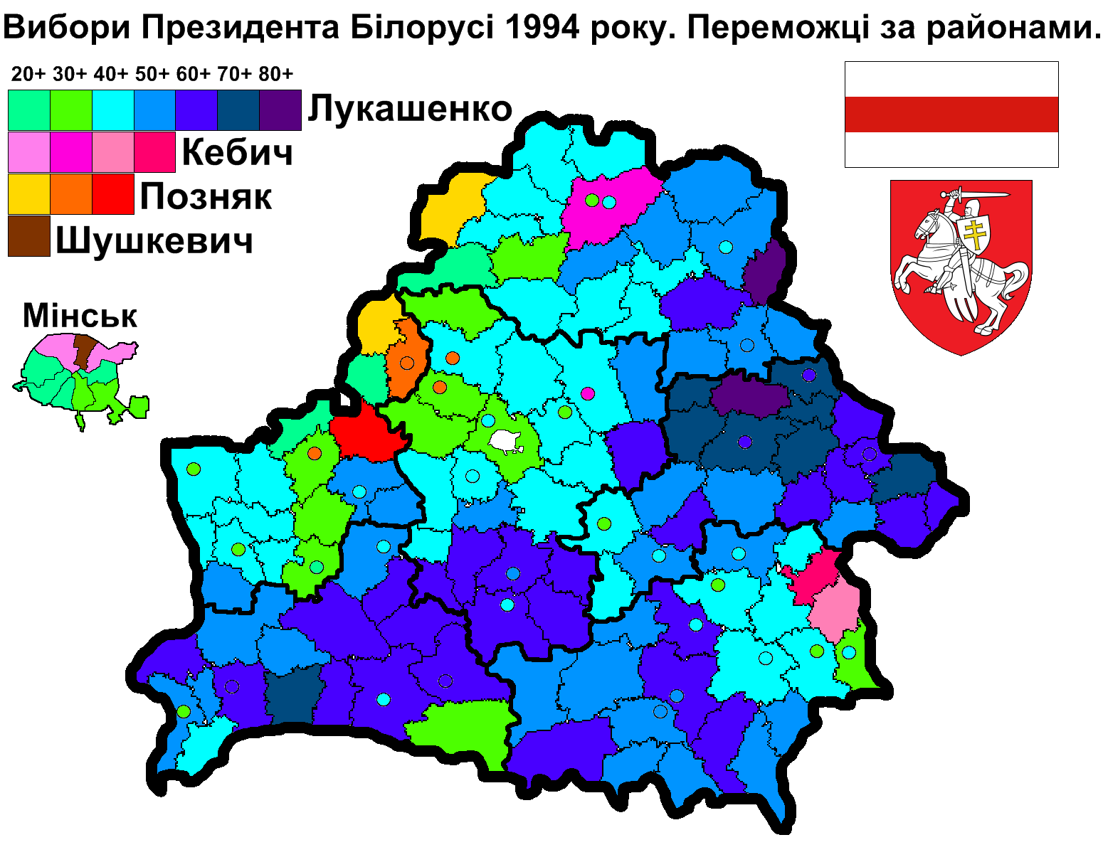 Вибори Президента Білорусі 1994. Переможці по районах